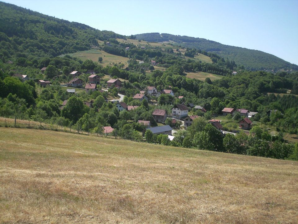 Kostići